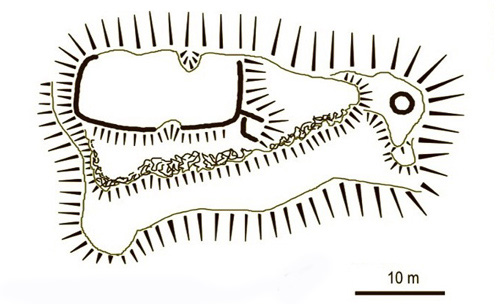 Бронецький замок (схема)